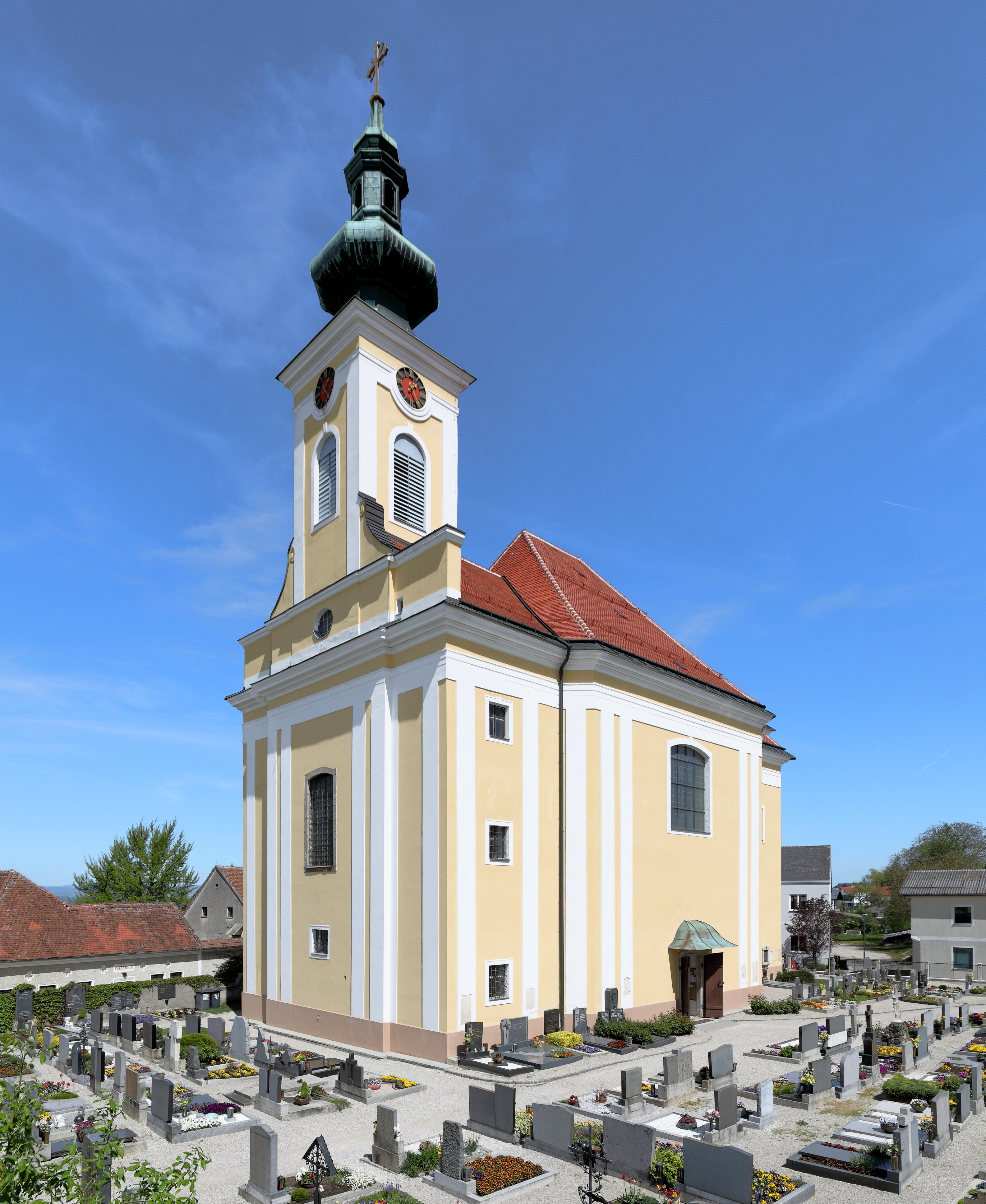 Südwestansicht der röm.-kath. Pfarrkirche hll. Petrus und Paulus in Oed, ein Ortsteil der niederösterreichischen Marktgemeinde Oed-Öhling. Die barocke Kirche, umgeben von einem Friedhof, wurde von 1759 bis 1761 anstelle einer Vorgängerkirche nach Plänen von Paul Ulrich Trientl errichtet.